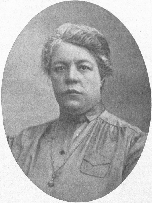 Массалитинова, Варвара Осиповна